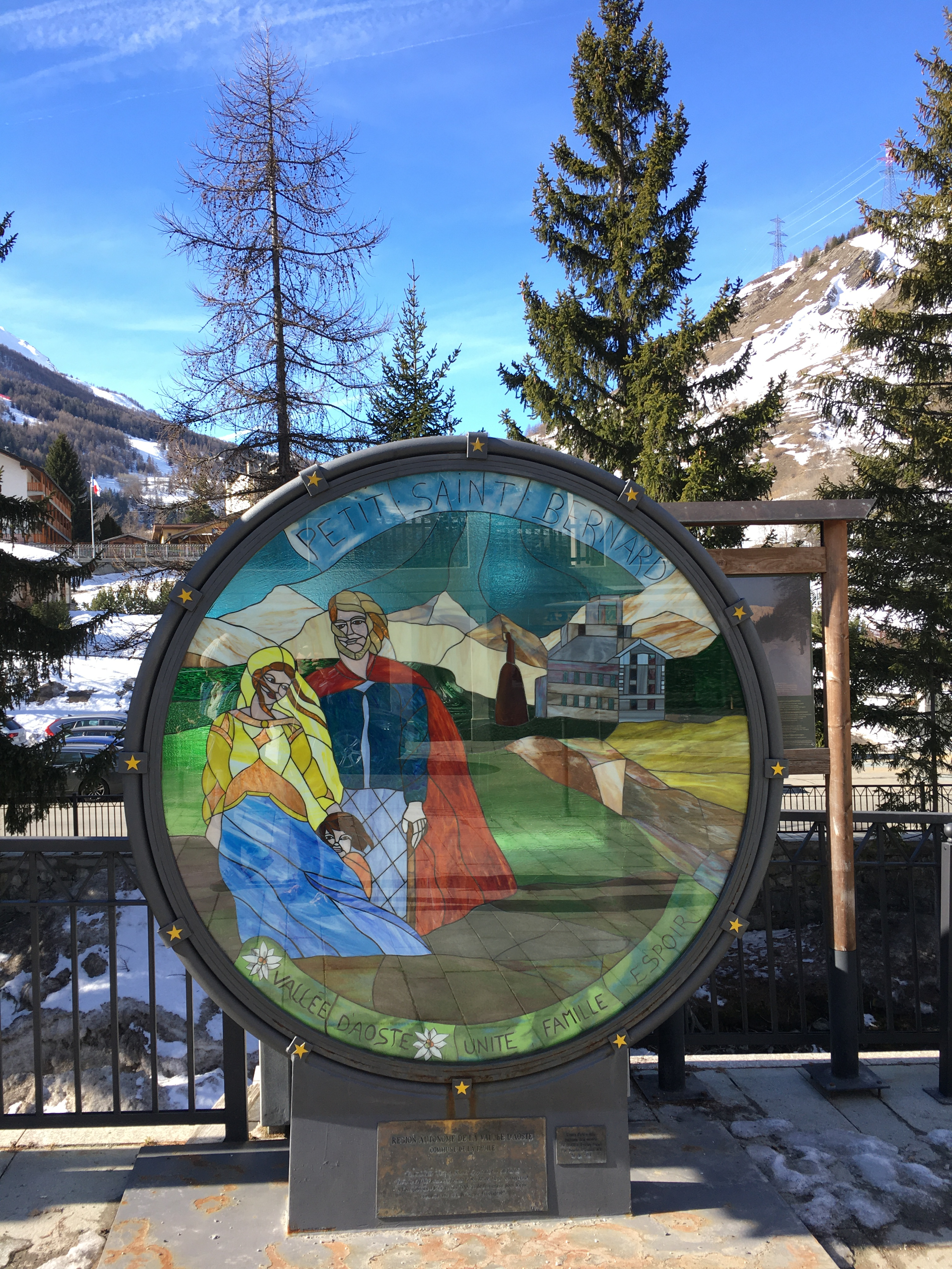 Uliczny witraż przedstawiającego małego św. Bernarda wraz z rodzicami, miejscowość La Thuile, dolina Aosty, Włochy, r. 2020.